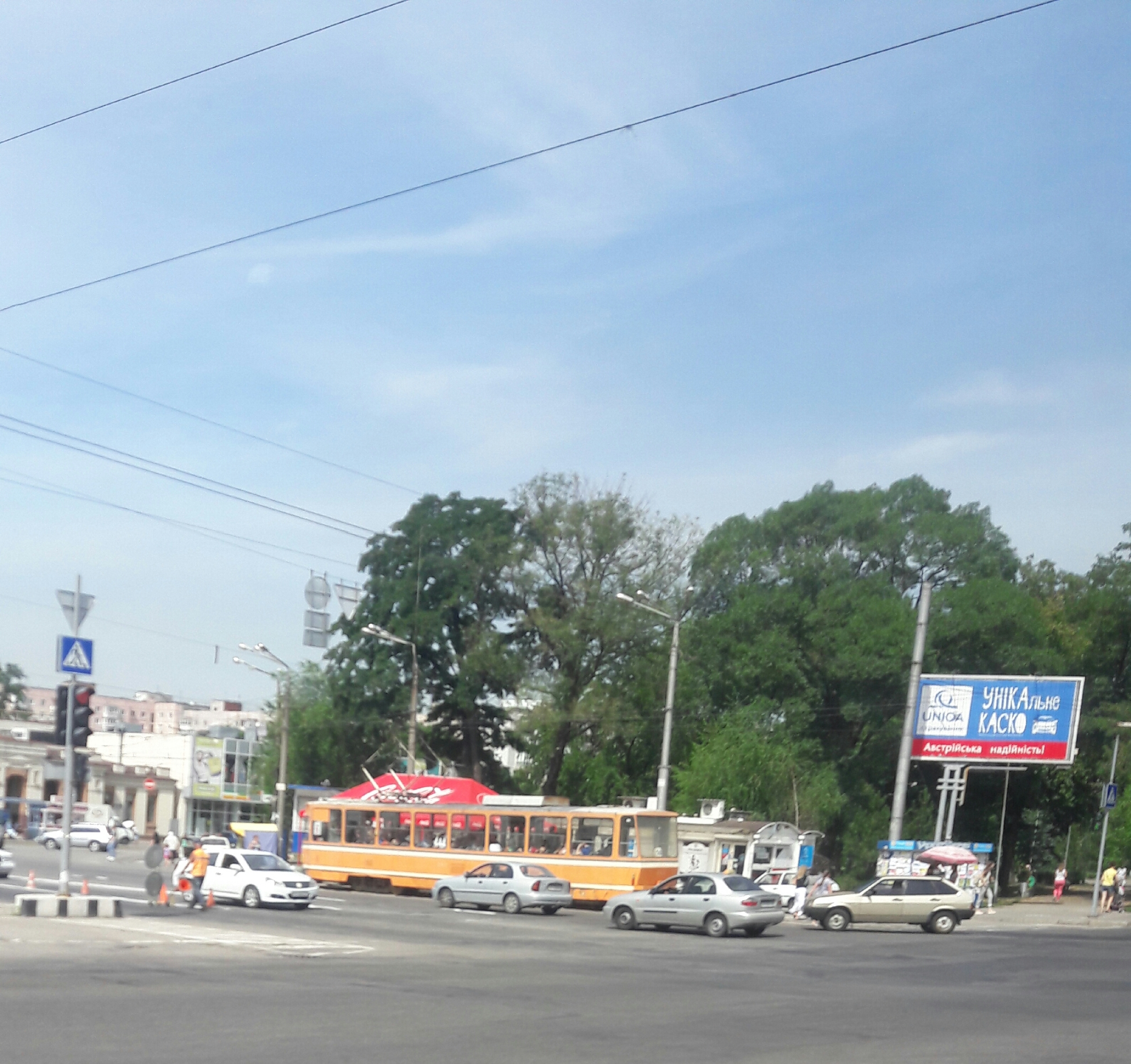 Запоріжжя, майдан Волі. Трамвай Tatra T6B5